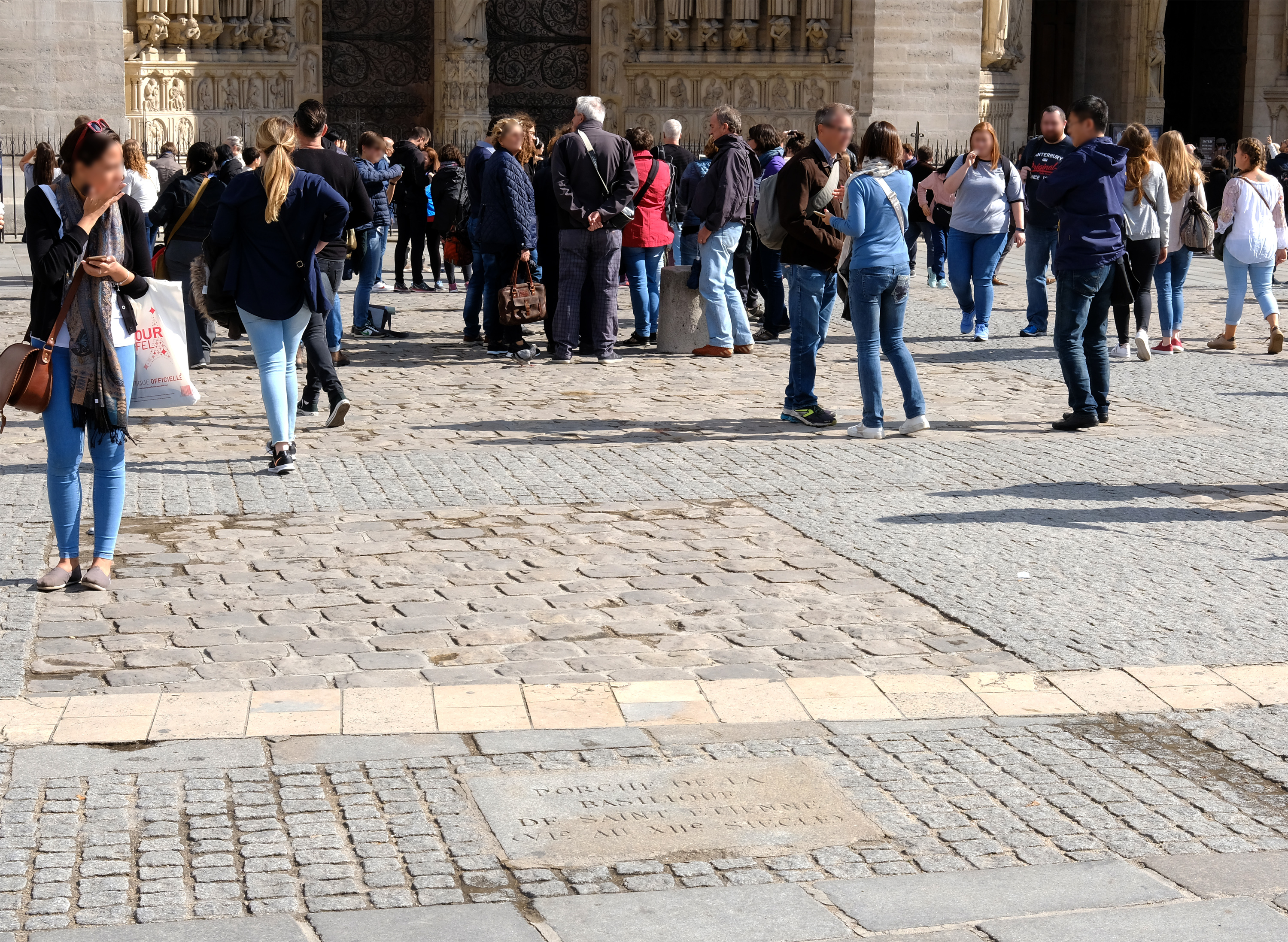 Parvis Notre-Dame de Paris (emplacement du porche de l'ancienne basilique St-Etienne) - Paris IV